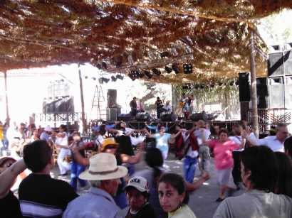 Pachamama Celebration 2007 in Amaicha del Valle